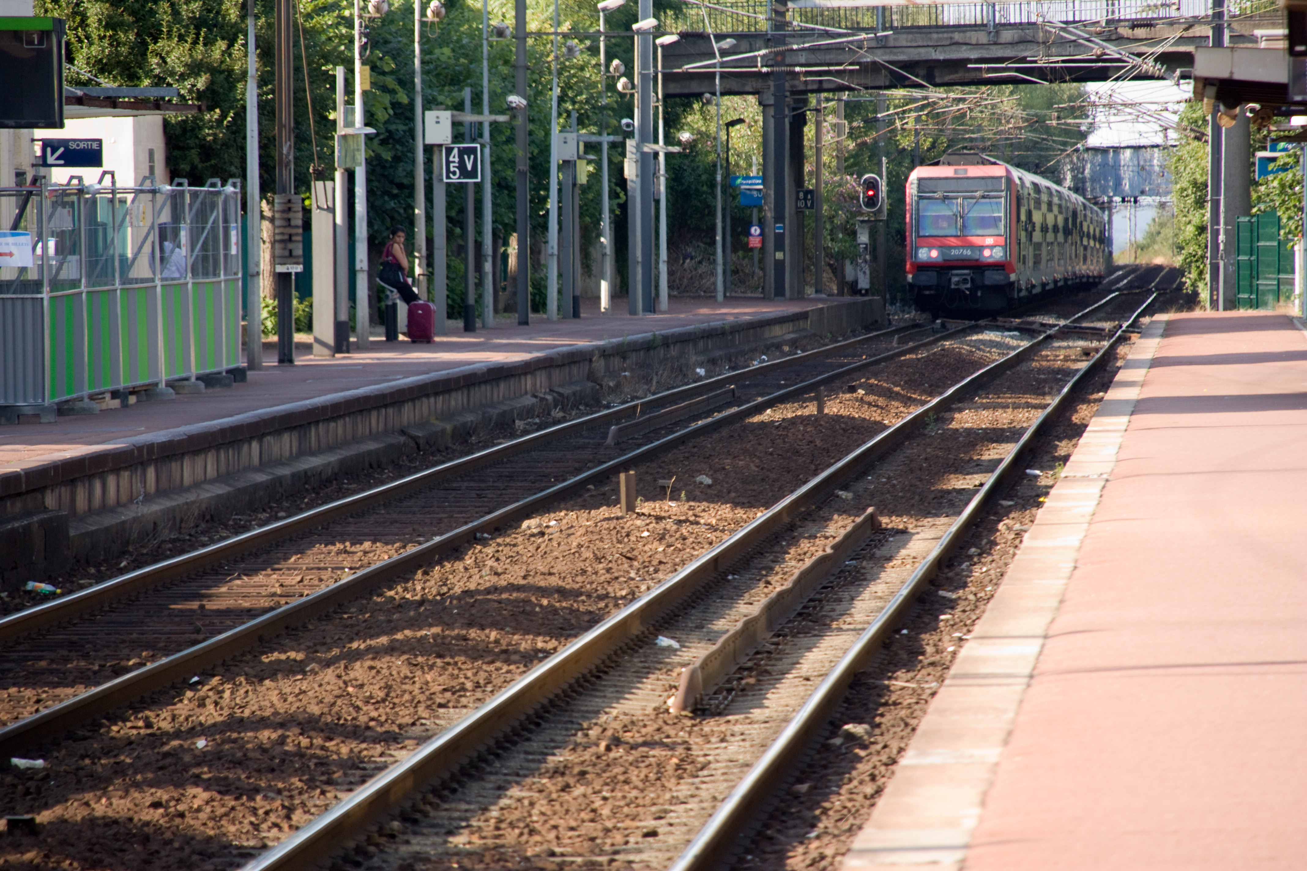 Gare de Survilliers - Fosses, département du Val-d'Oise, France